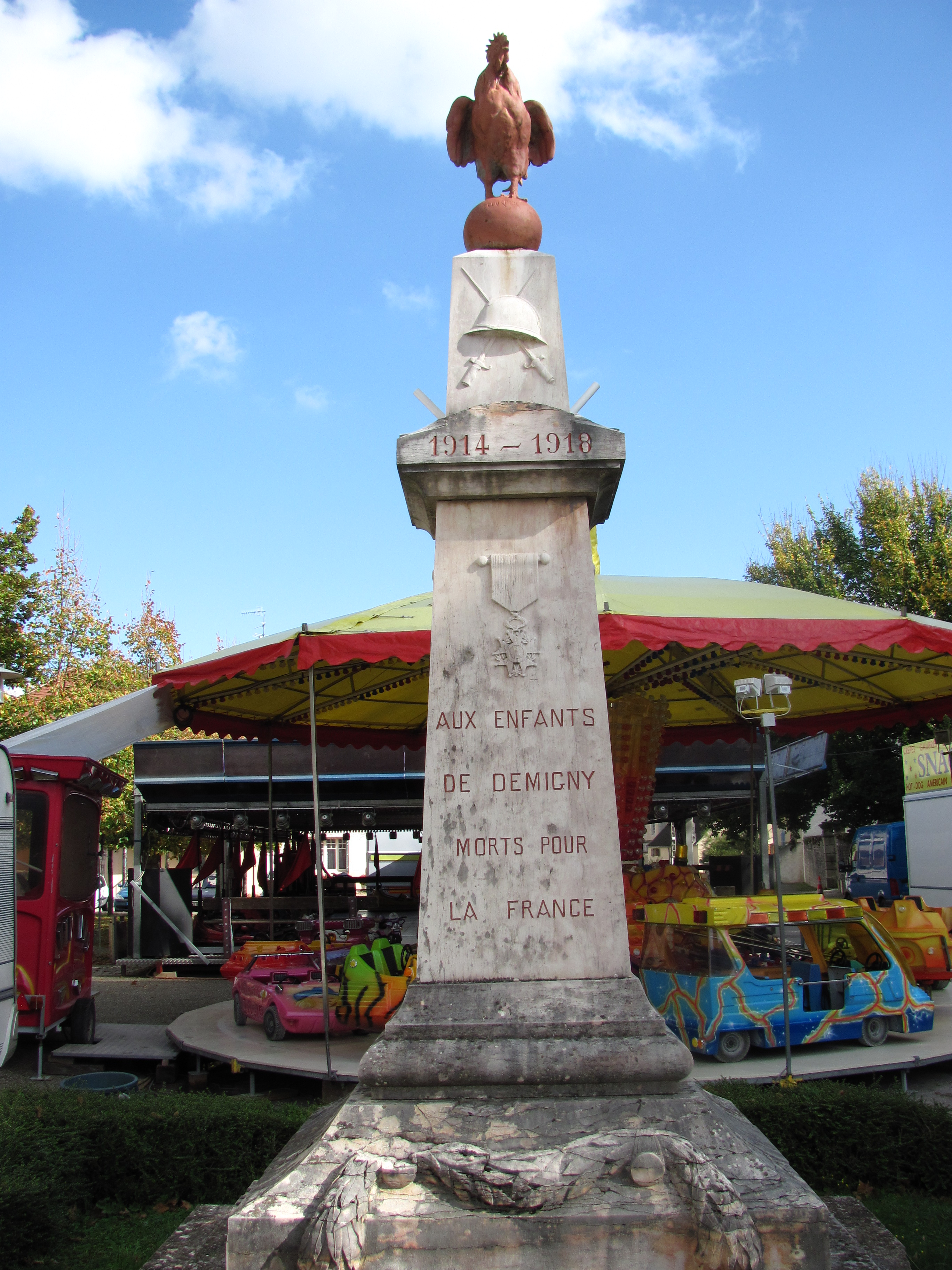 Monument aux morts Demigny (Saône et Loire)